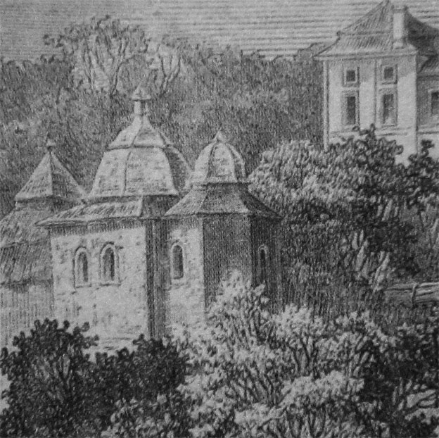 Вигляд «замкової» церква у Новому Вишневці до перебудови у 1870-их роках. Фрагмент гравюри.